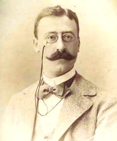 Jacques Mieses (1865 - 1954)